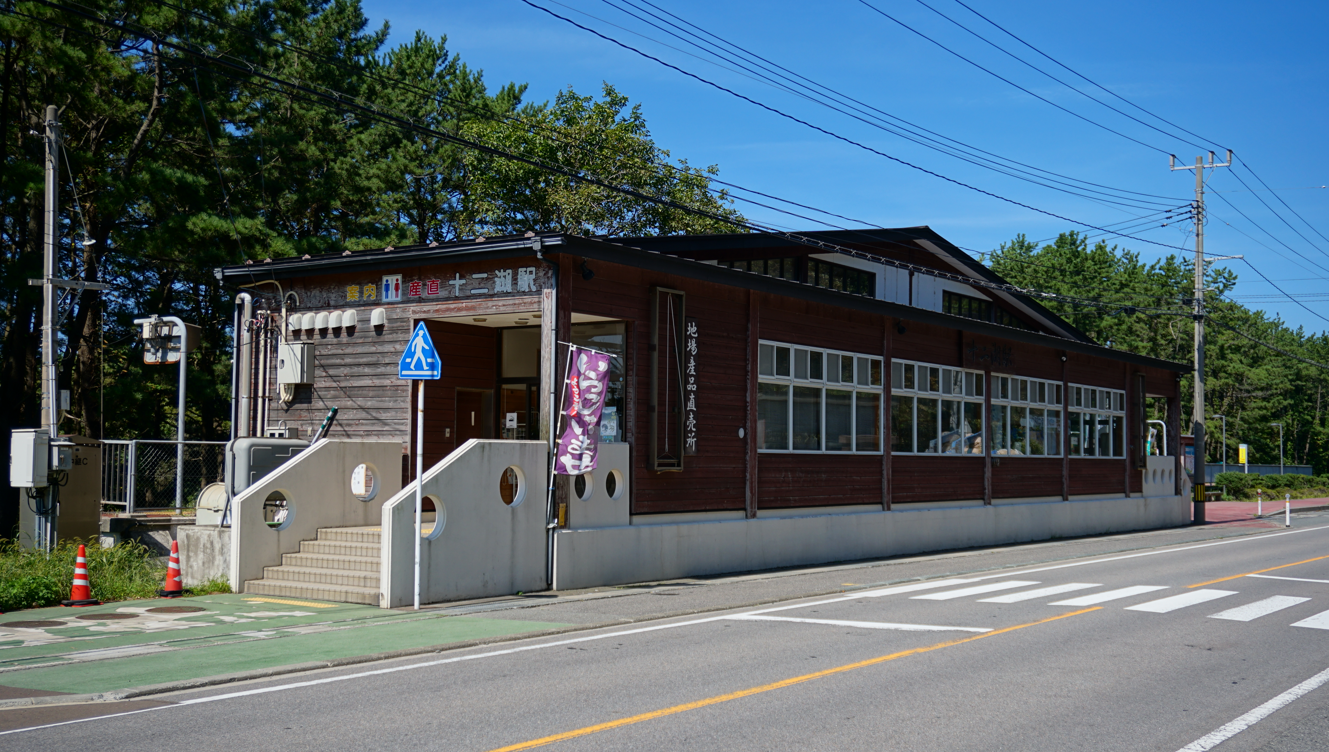 五能線 十二湖駅（青森県西津軽郡深浦町）